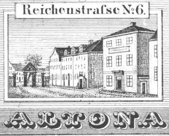 Ausschnitt aus einer Werbung der Steindruckerei von Ludewig Schultz, Reichenstraße No. 6, Altona. Das Nobistor am Ende der Straße führt in die Hamburger Vorstadt St. Pauli